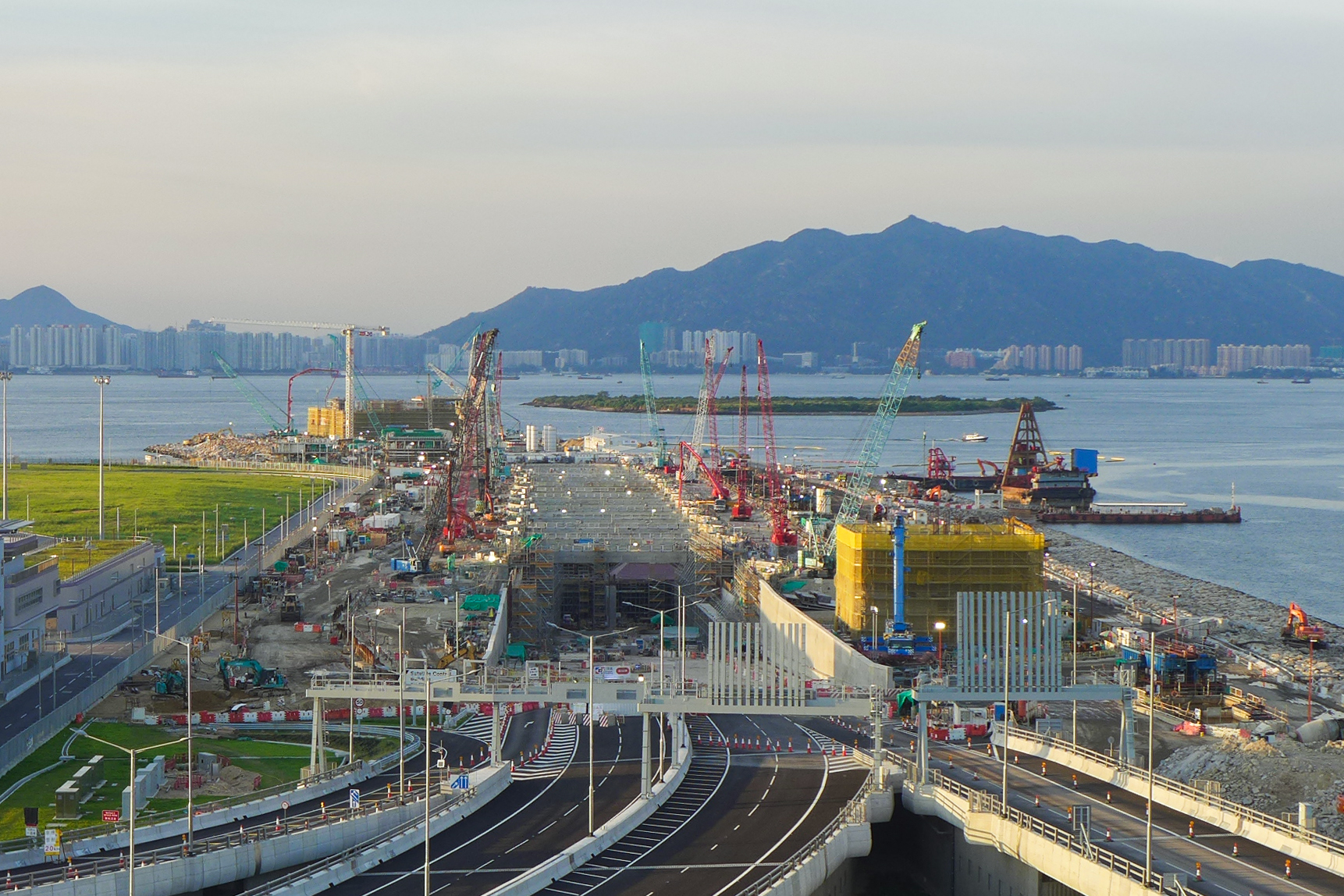 Tuen Mun–Chek Lap Kok Link site